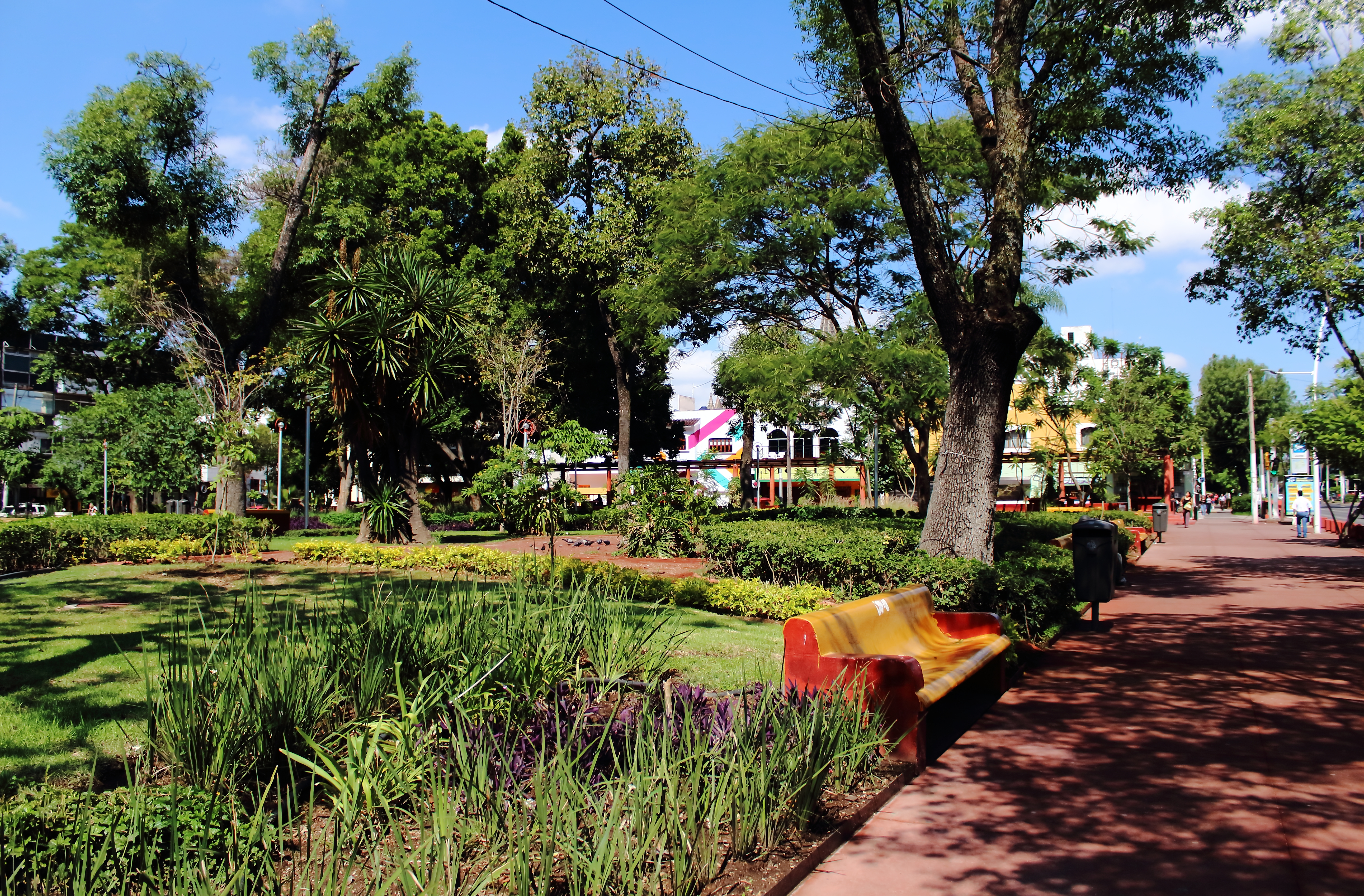 Vista del Parque Revolución o también conocido como el "Parque rojo". Es un lugar en donde se pueden practicar diferentes hobbies.